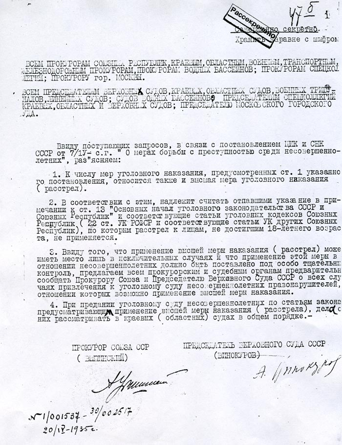 Разъяснение органам суда и прокуратуры